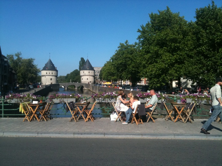 terras op de leiebrug